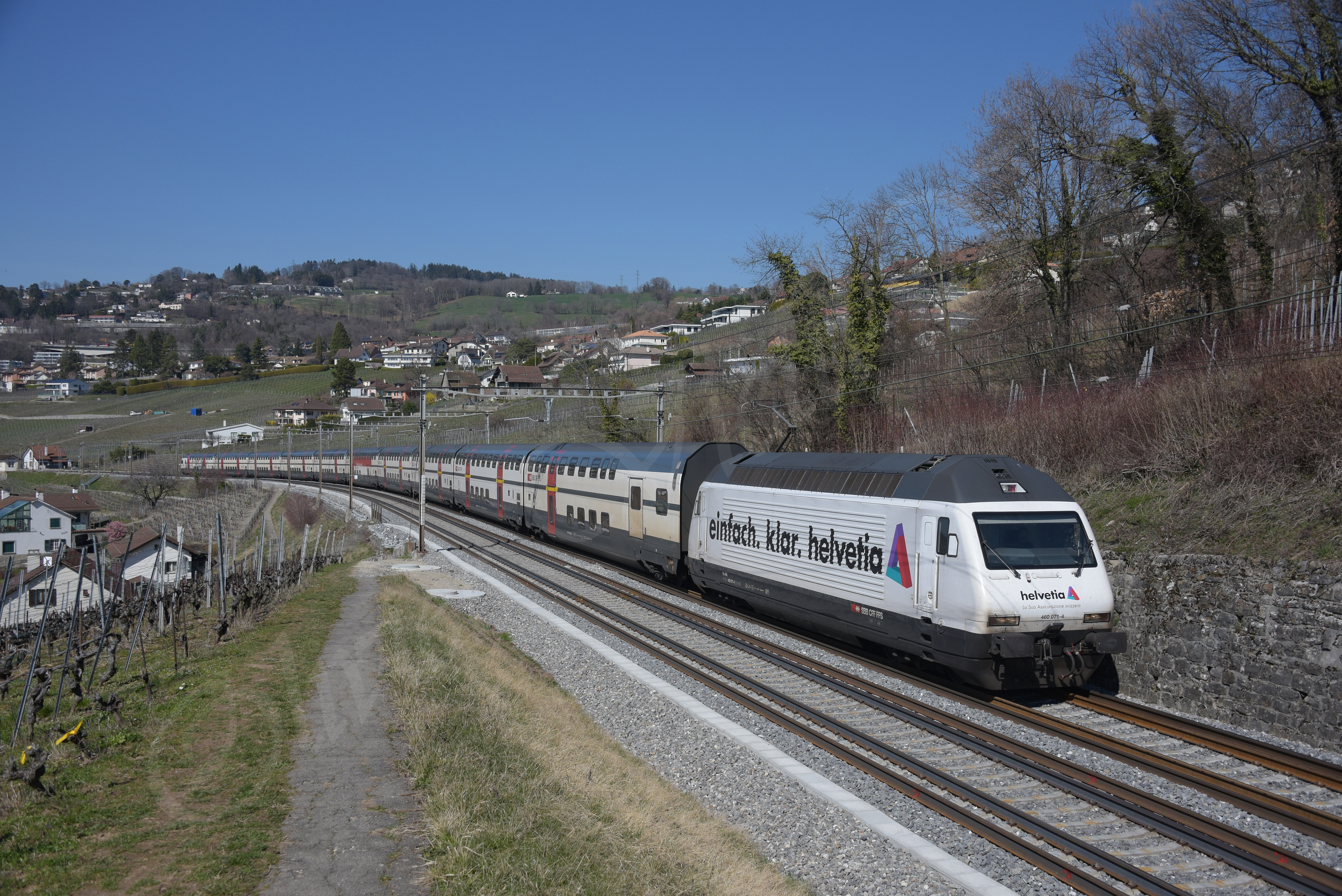 Re 460 071 °Mittelland°porte la publicité pour Helvetia Ici à Bossière